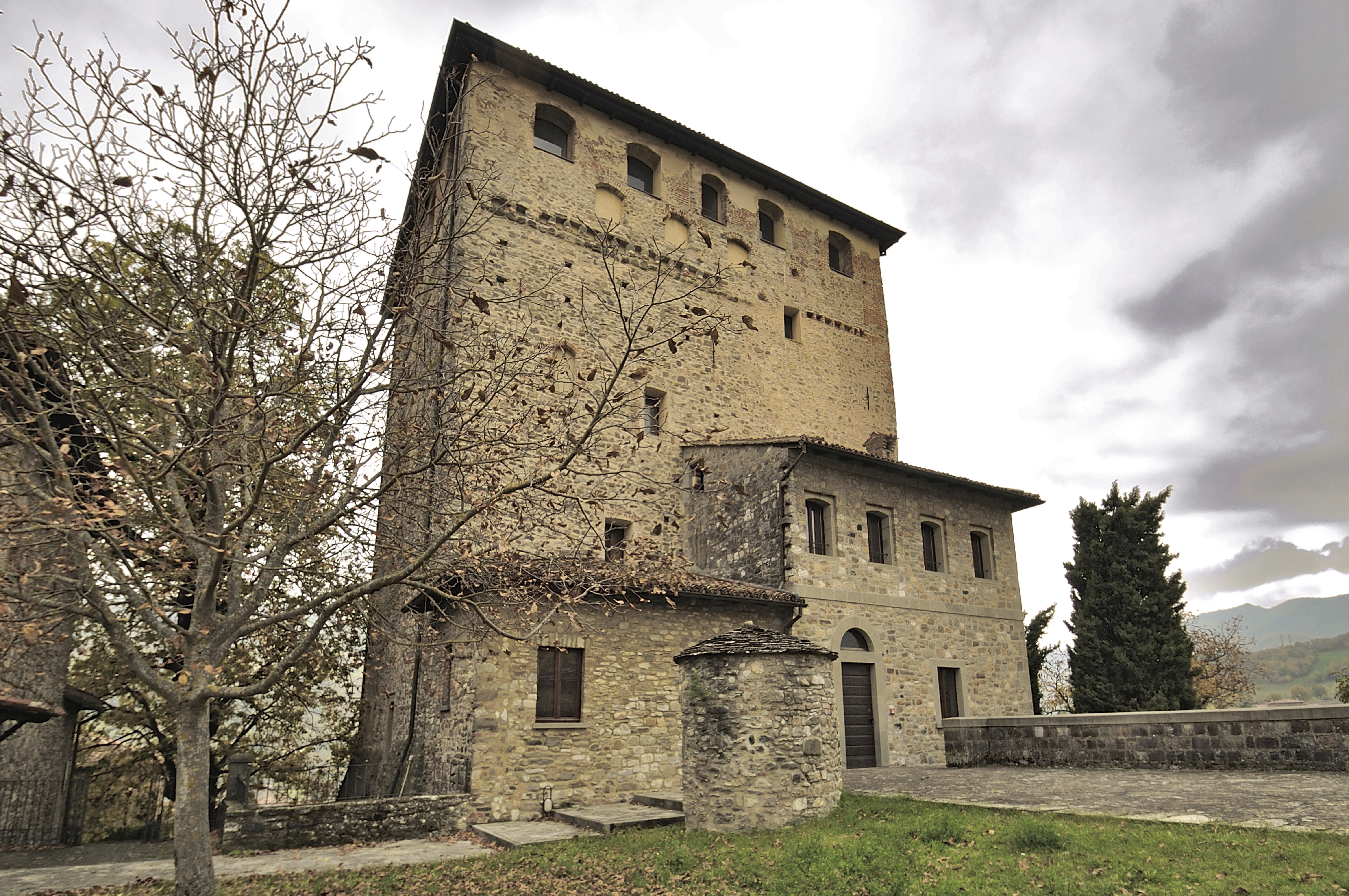 Bobbio, Castello Malaspina Dal Verme - MIBAC This is a photo of a monument which is part of cultural heritage of Italy.